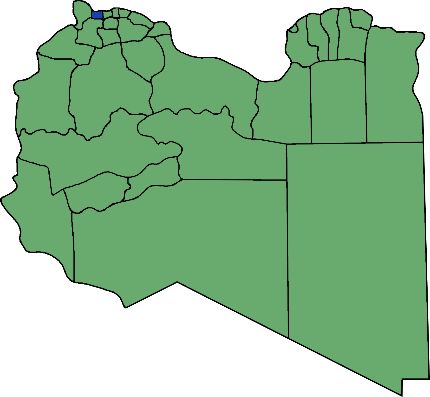 Die neuen Gemeinden (Munizipien) in Libyen. Sabratha Wa Surman hervorgehoben.